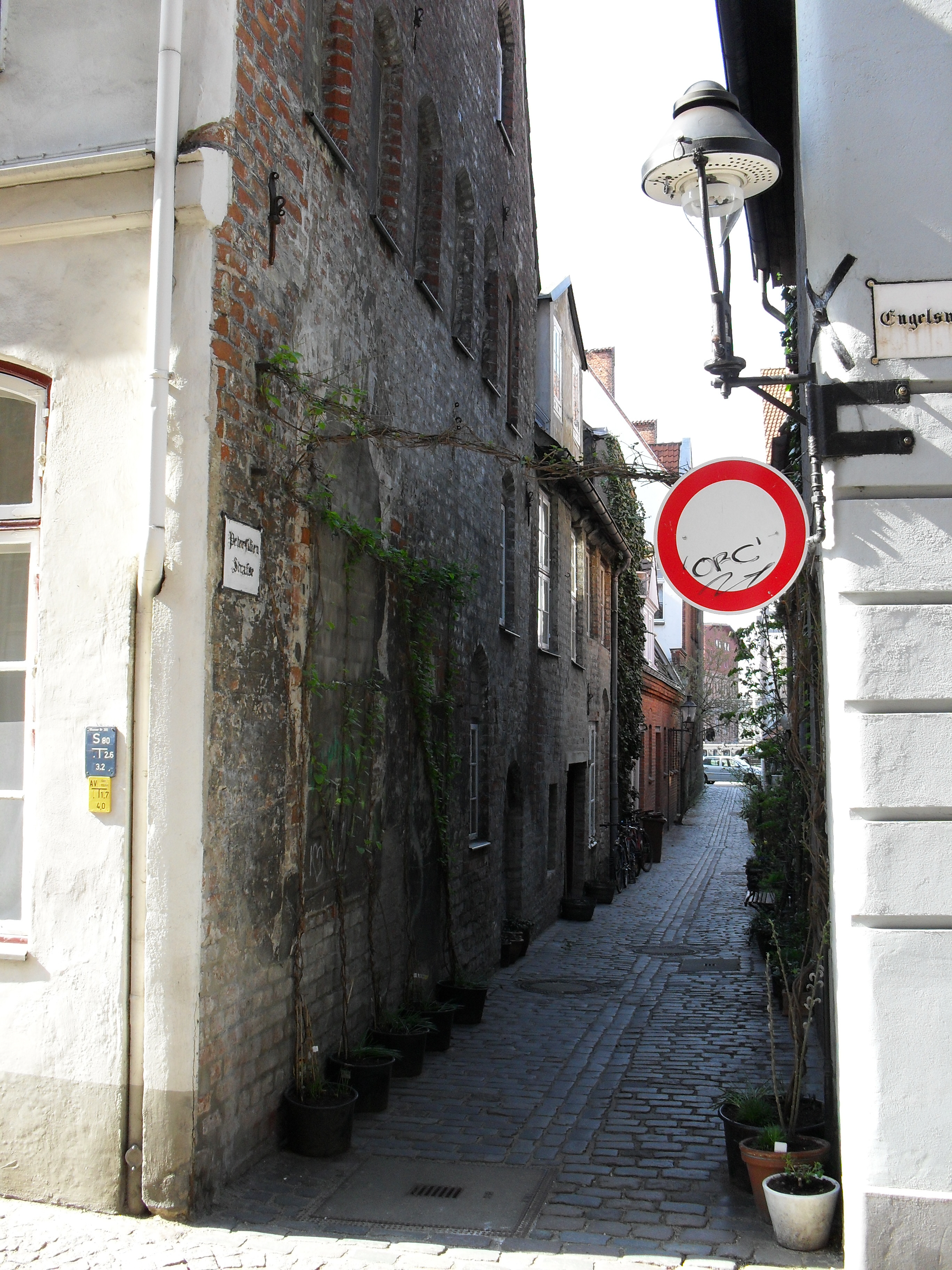 Die Petersilienstraße in Lübeck